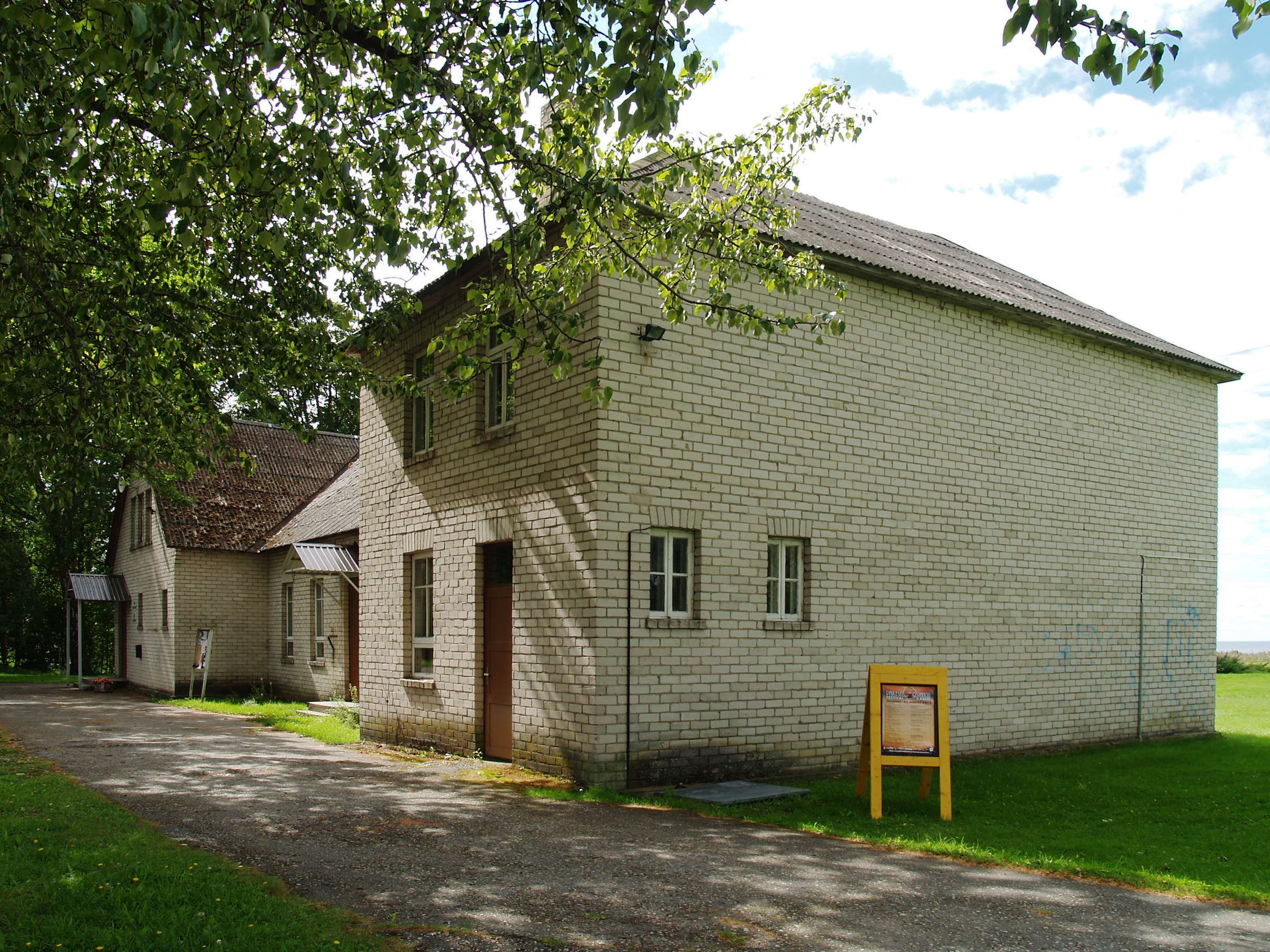 Kabli seltsimaja ja raamatukogu.